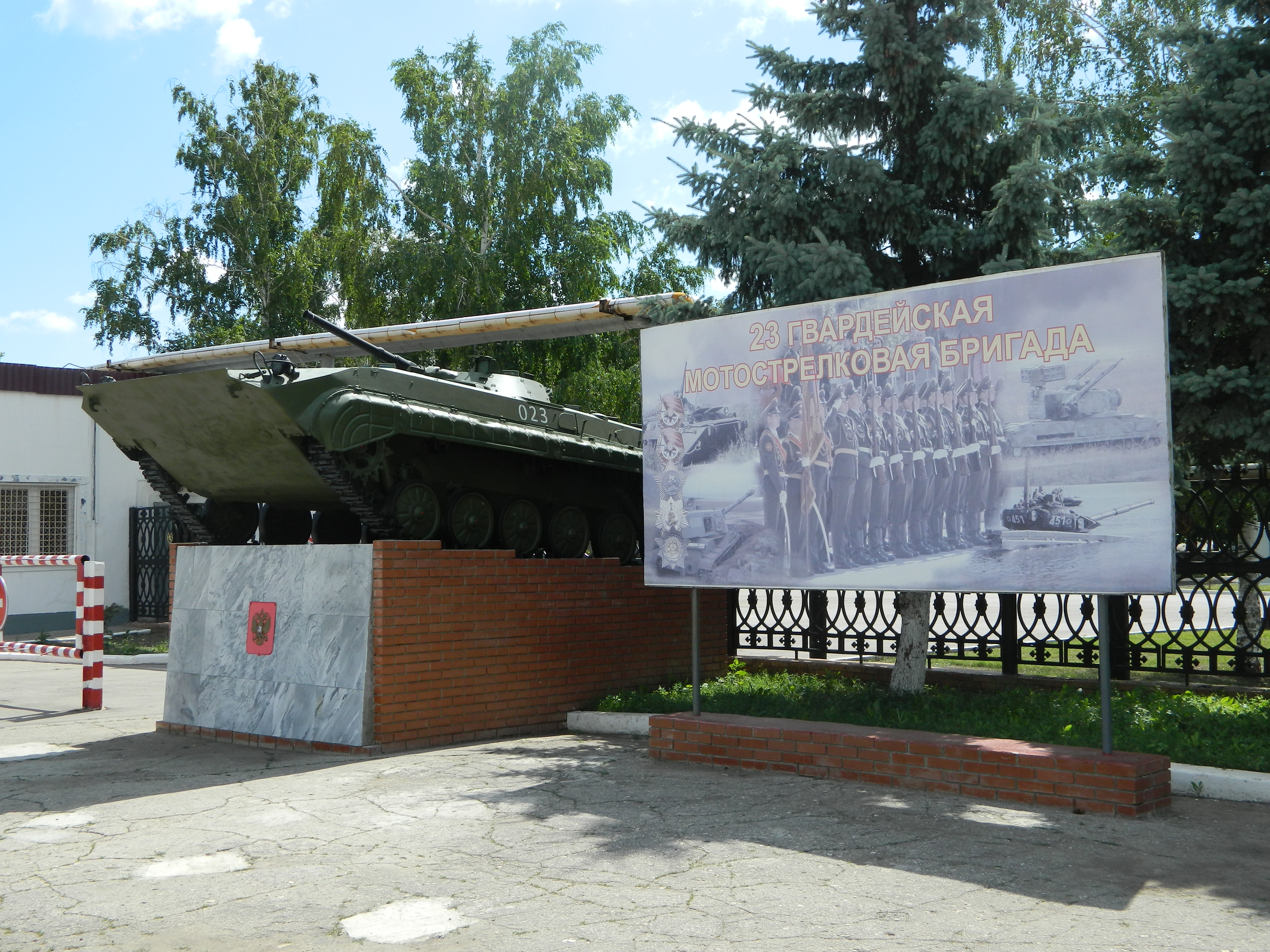 Контрольно-пропускной пункт 23 ОМСБр (до июня 2009 года - 81 МСП)